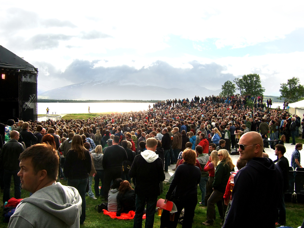 Tromsø Open Air Festival, Buktafestivalen, concert scene. 2007